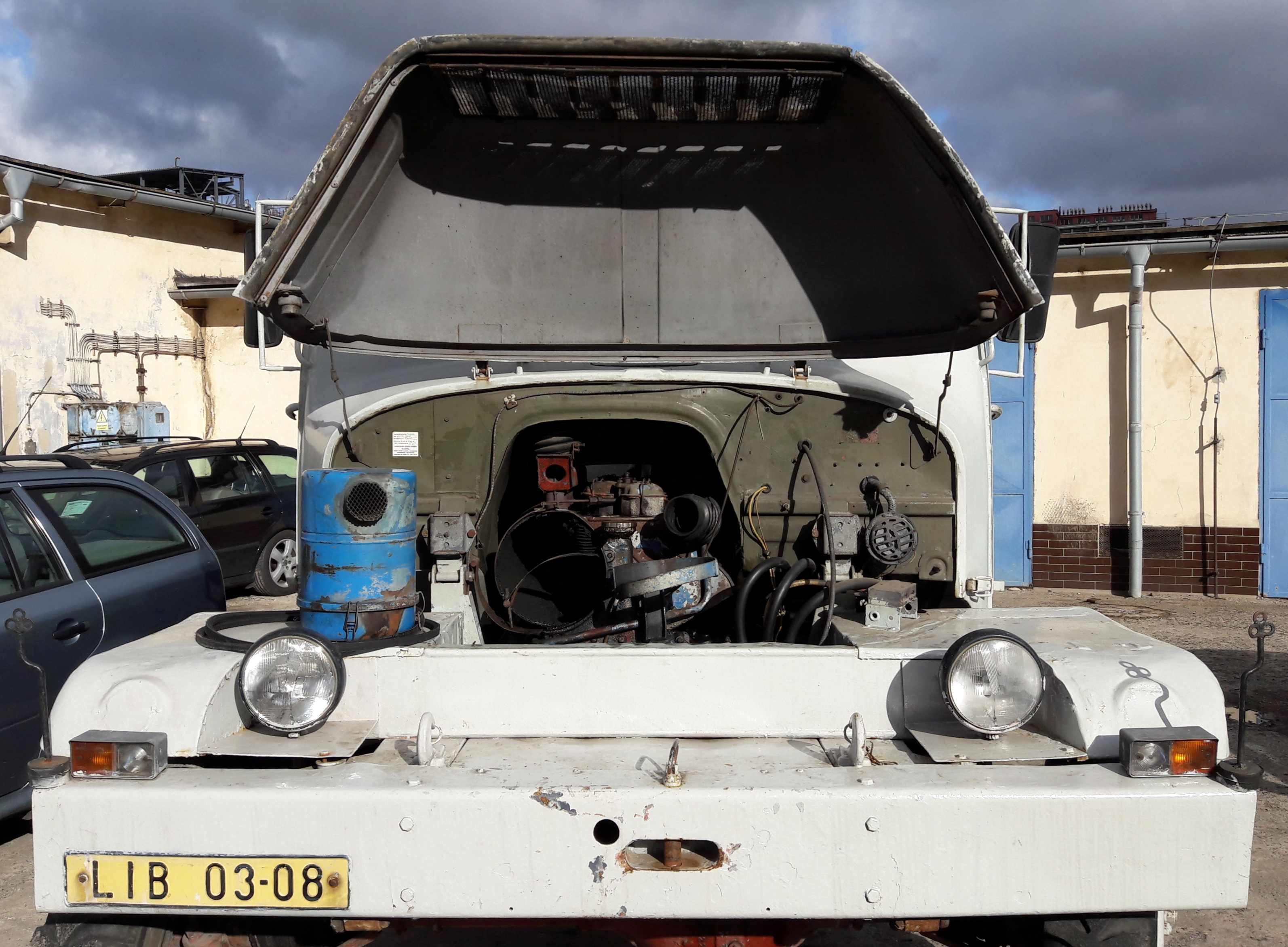 Praga V3S cisterna otevrena kapota.